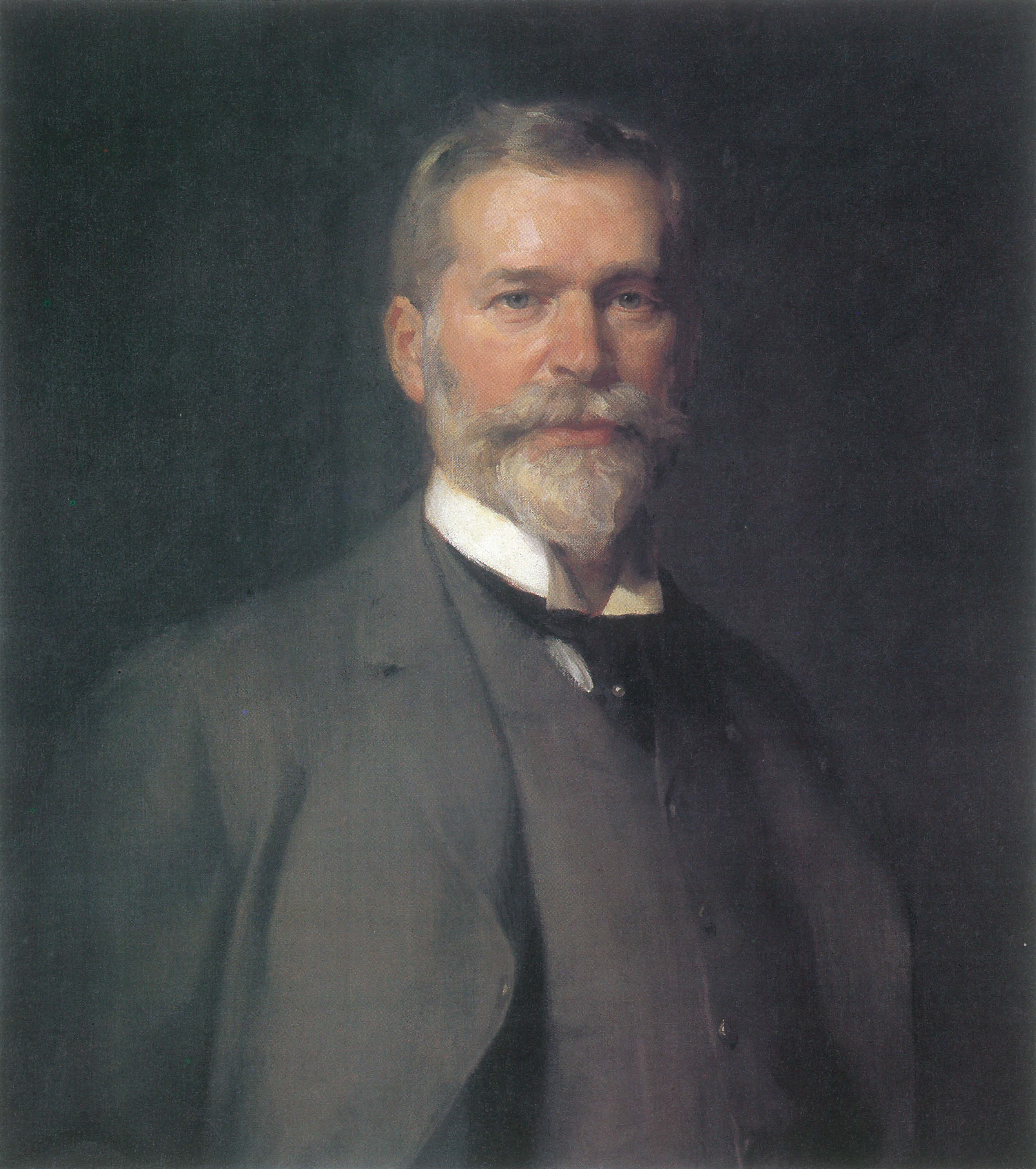 Porträt von Wilhelm Merton